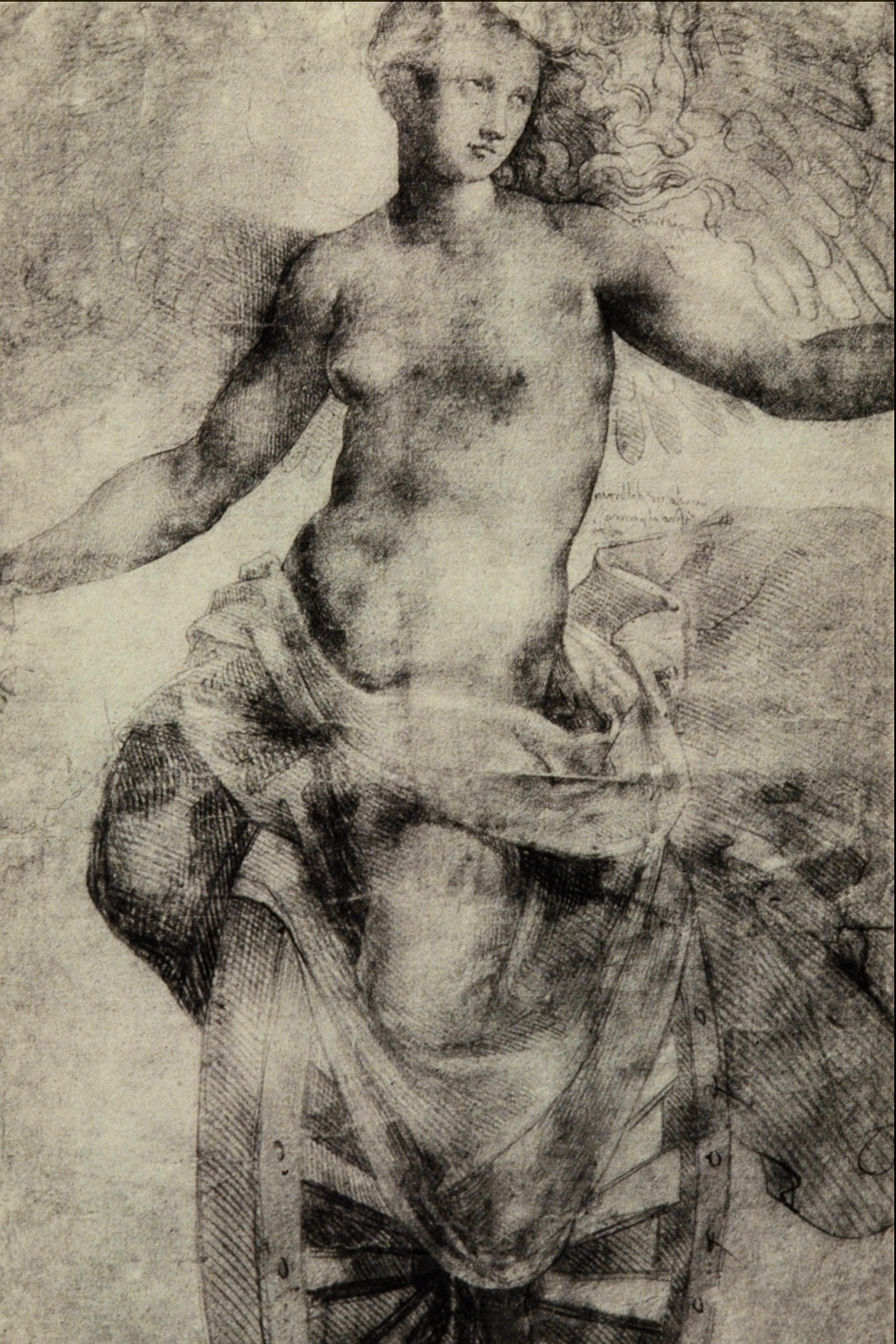 La Fortuna